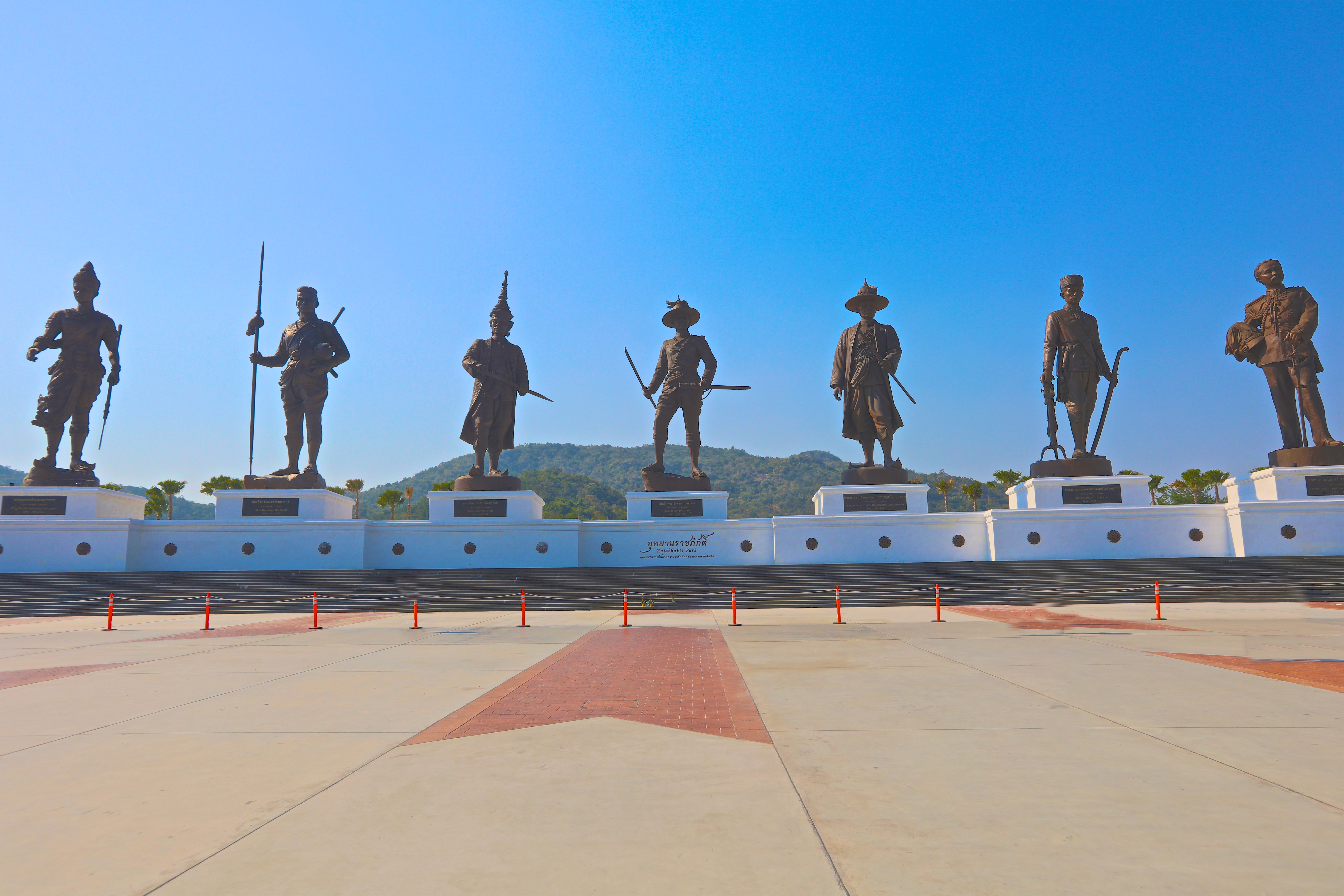 Rajabhakti Park Hua Hin